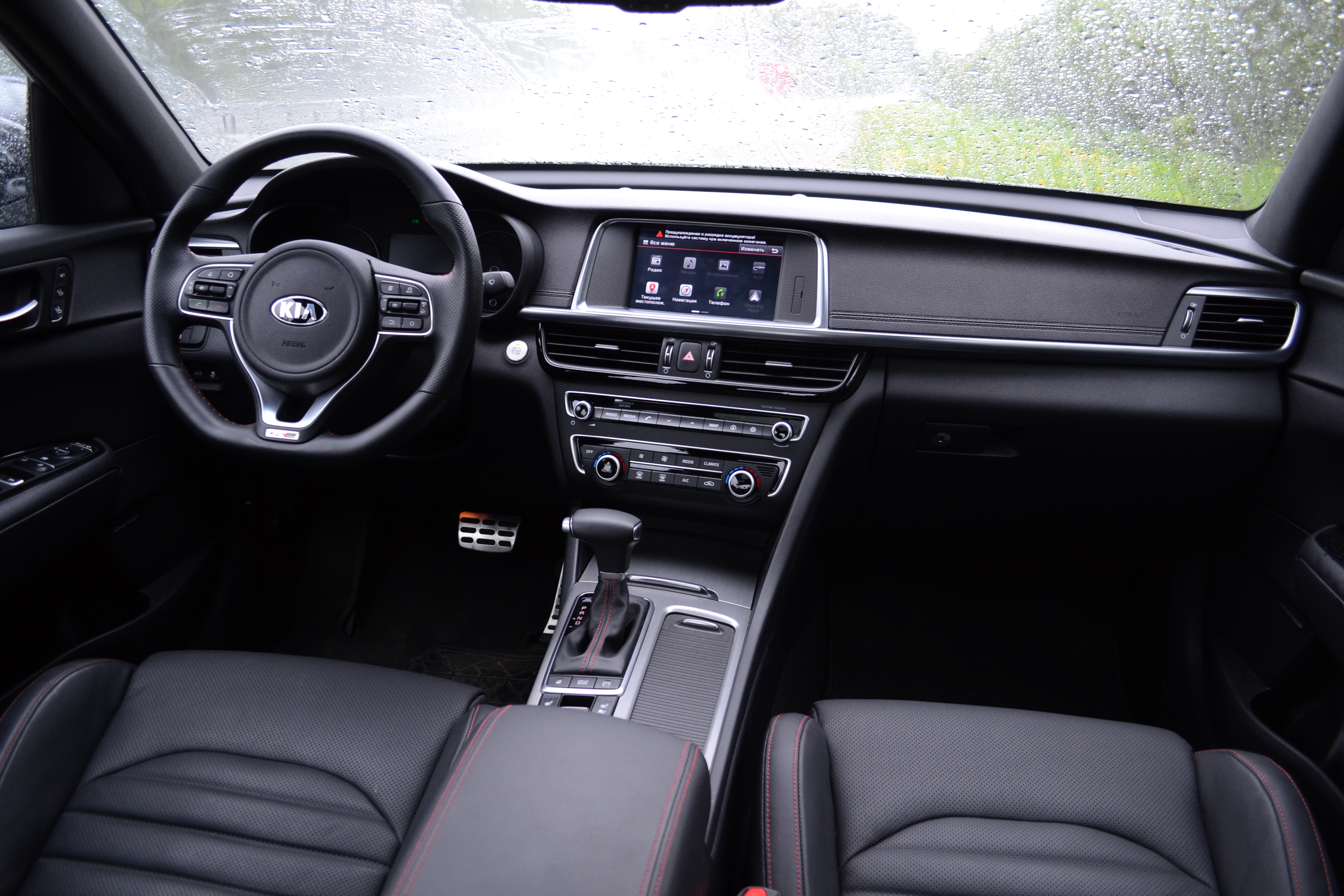 Интерьер седана Kia Optima (JF)